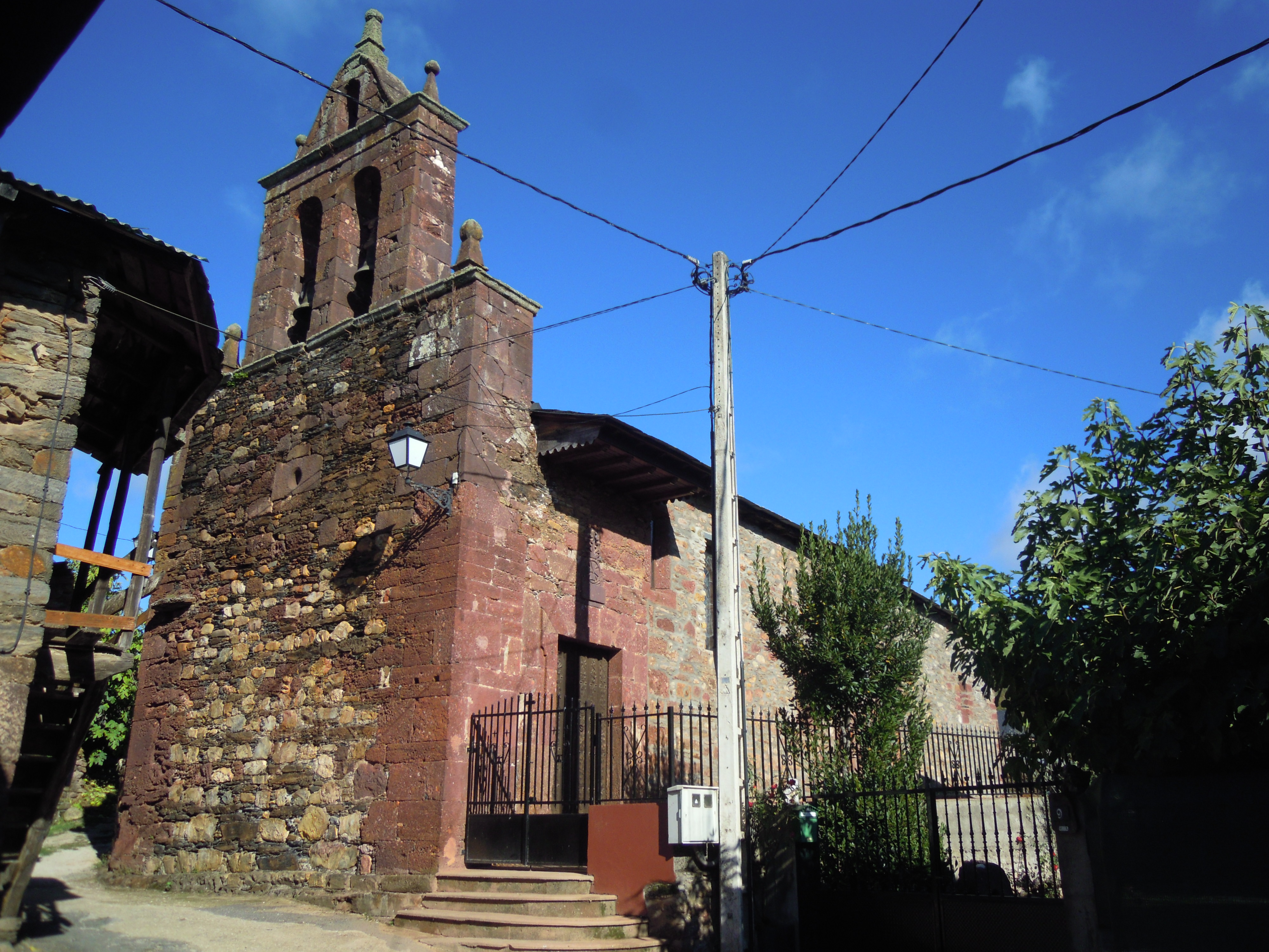 Igrexa parroquial de Éntoma (O Barco de Valdeorras)